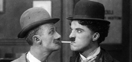 Кадр из фильма "Его новая работа"